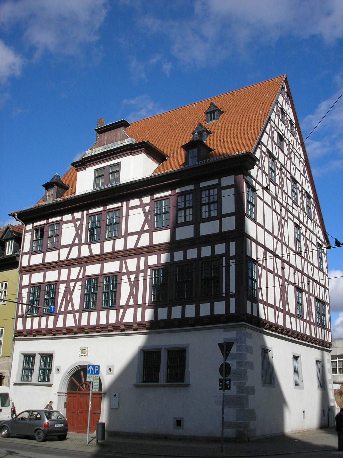 Das Haus zum grünen Sittich und gekrönten Hecht - Johannesstraße 178 in Erfurt (Thüringen)